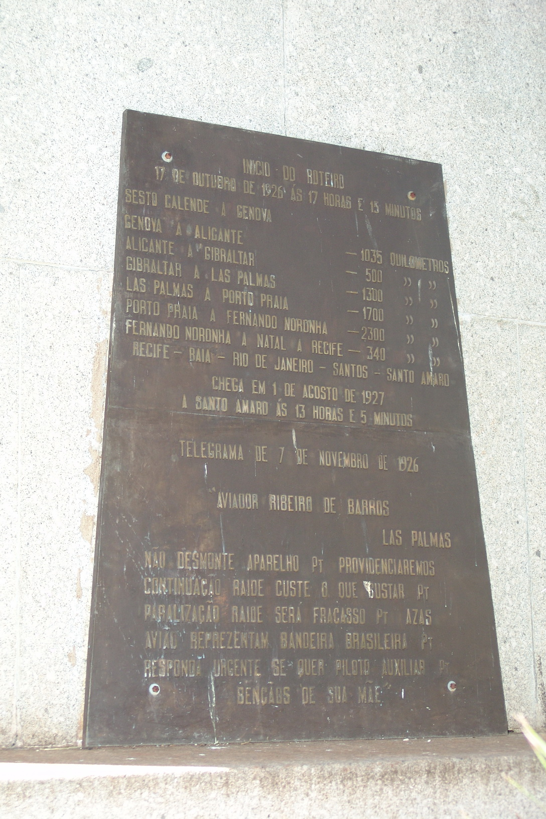 Foto do município de Jaú, São Paulo, Brasil